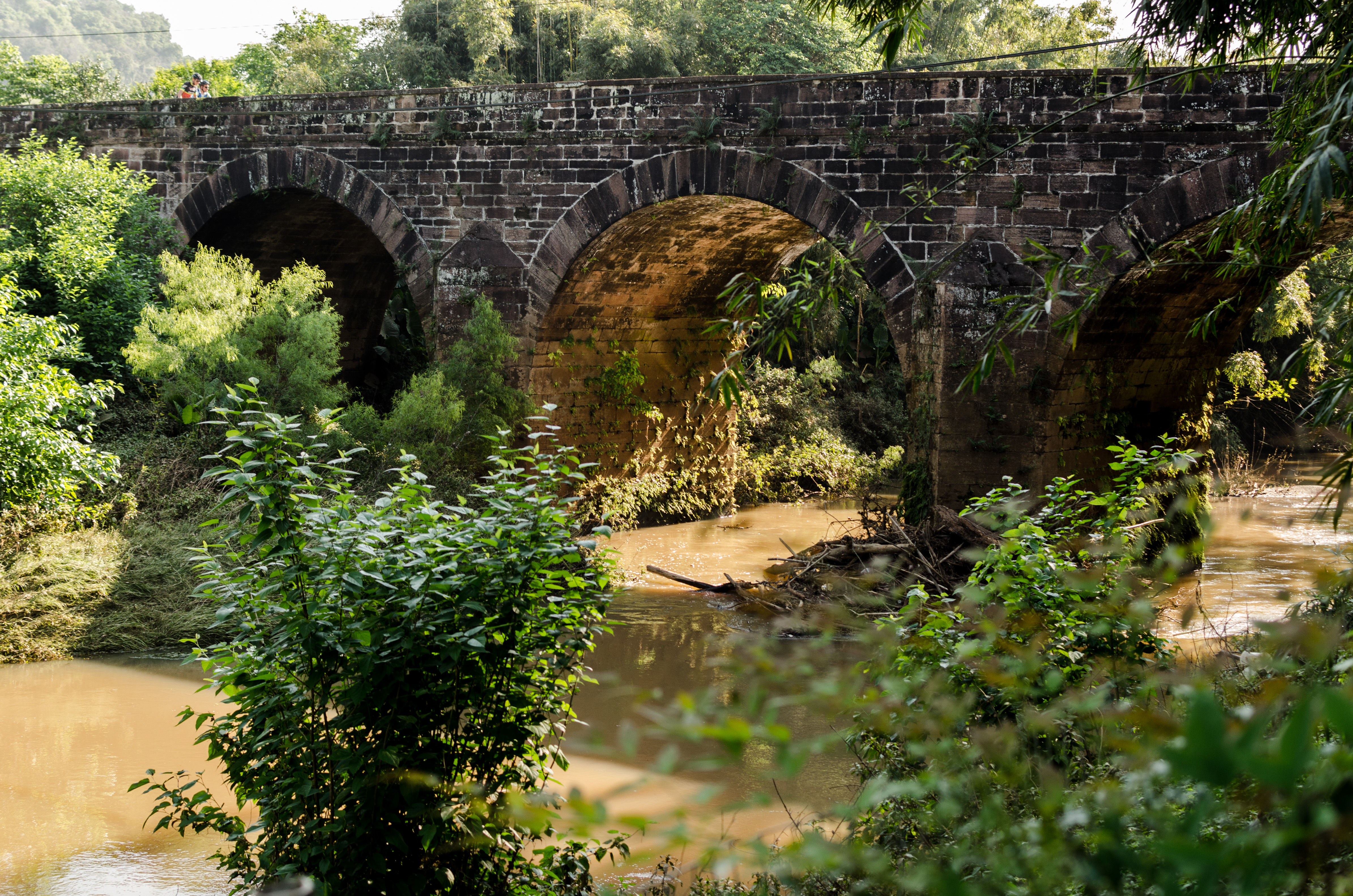 Ponte do Imperador, construída sobre o Rio Feitoria, em pedra de cantaria lavrada, com 88 metros de comprimento, 14 metros de altura e 14 metros de largura